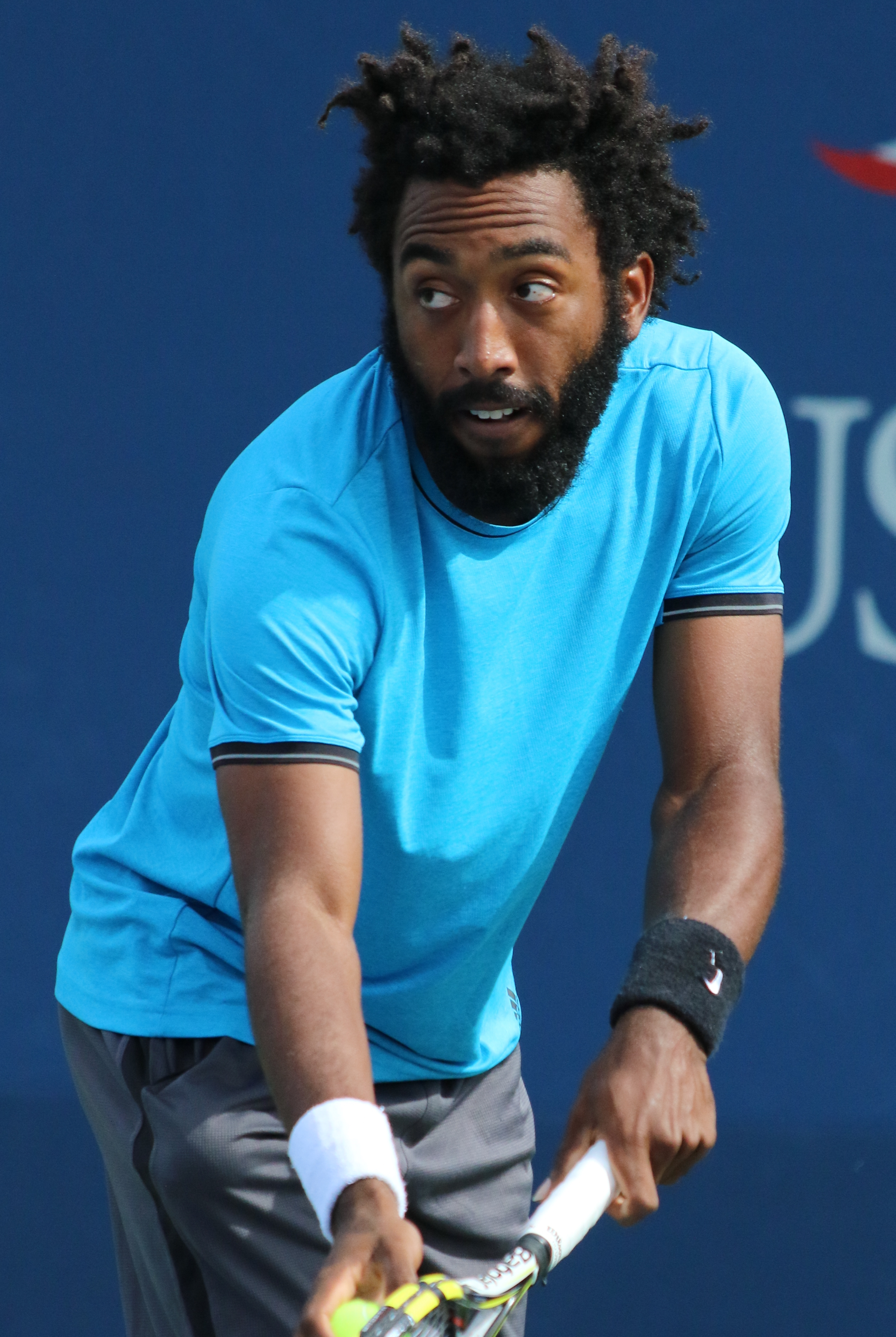 King E. US16 (17)